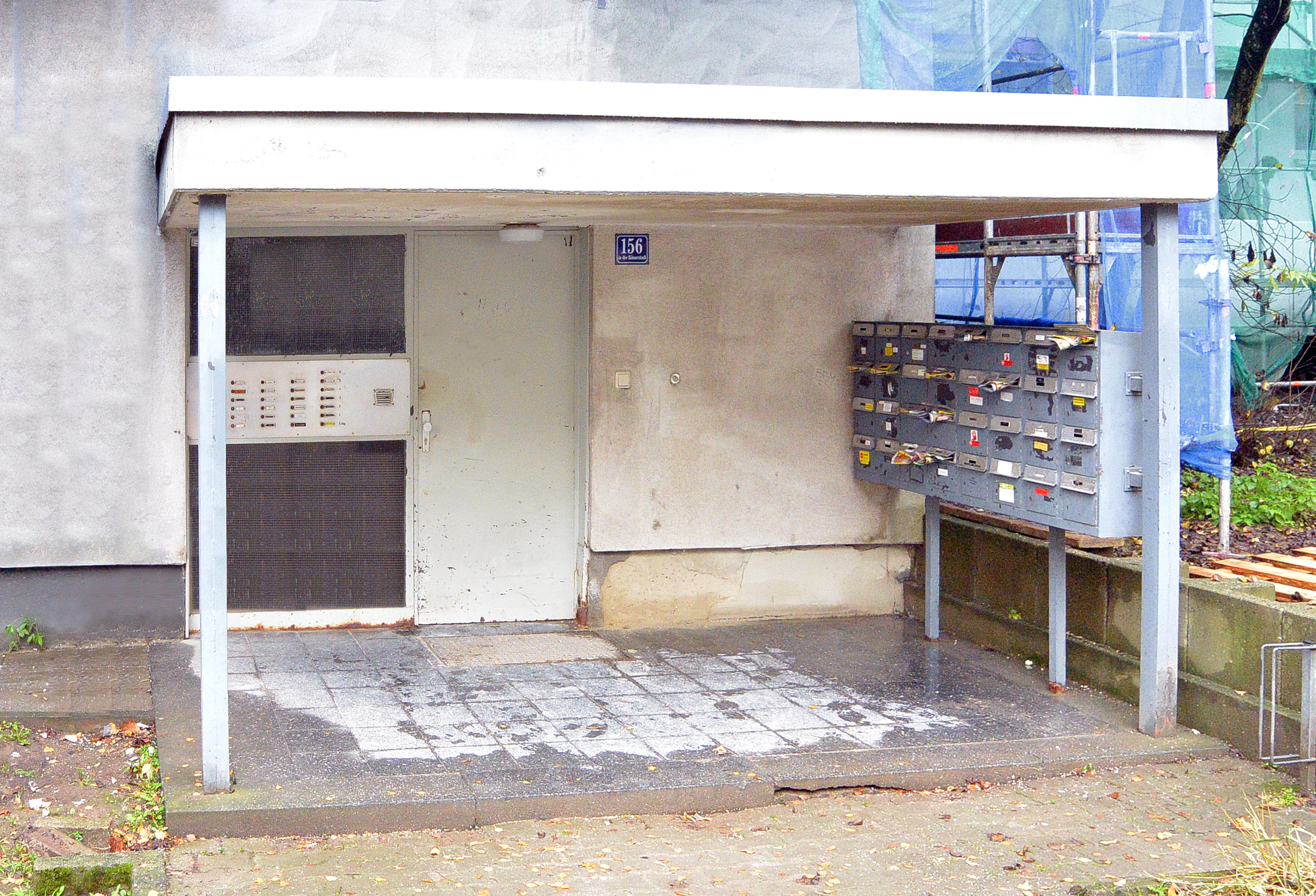 Eine funktionalistische Gestaltung und filigrane Profile zeichen die Ausstattung der Bauten in der Nordweststadt aus.